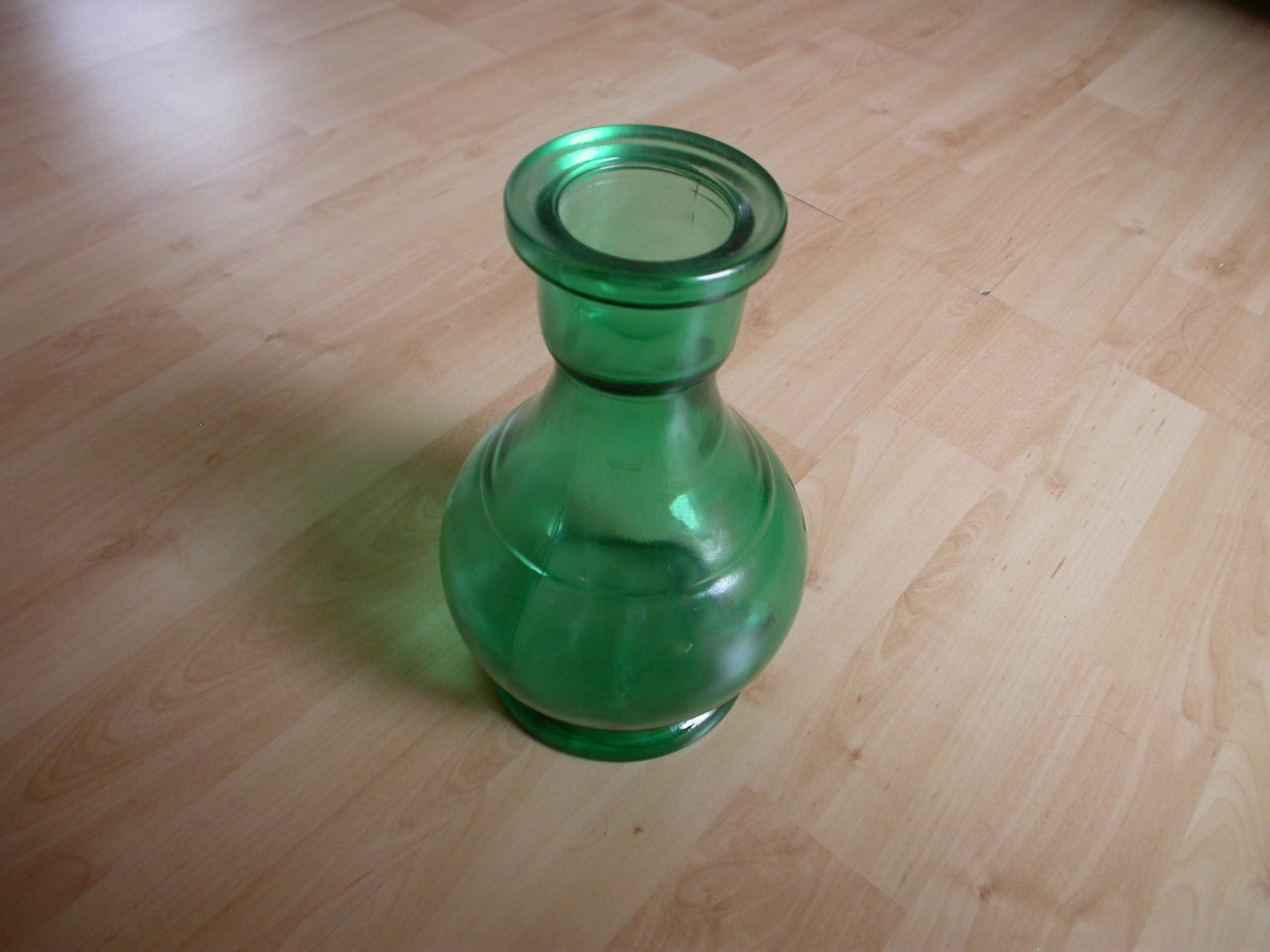 Shisha Bilder